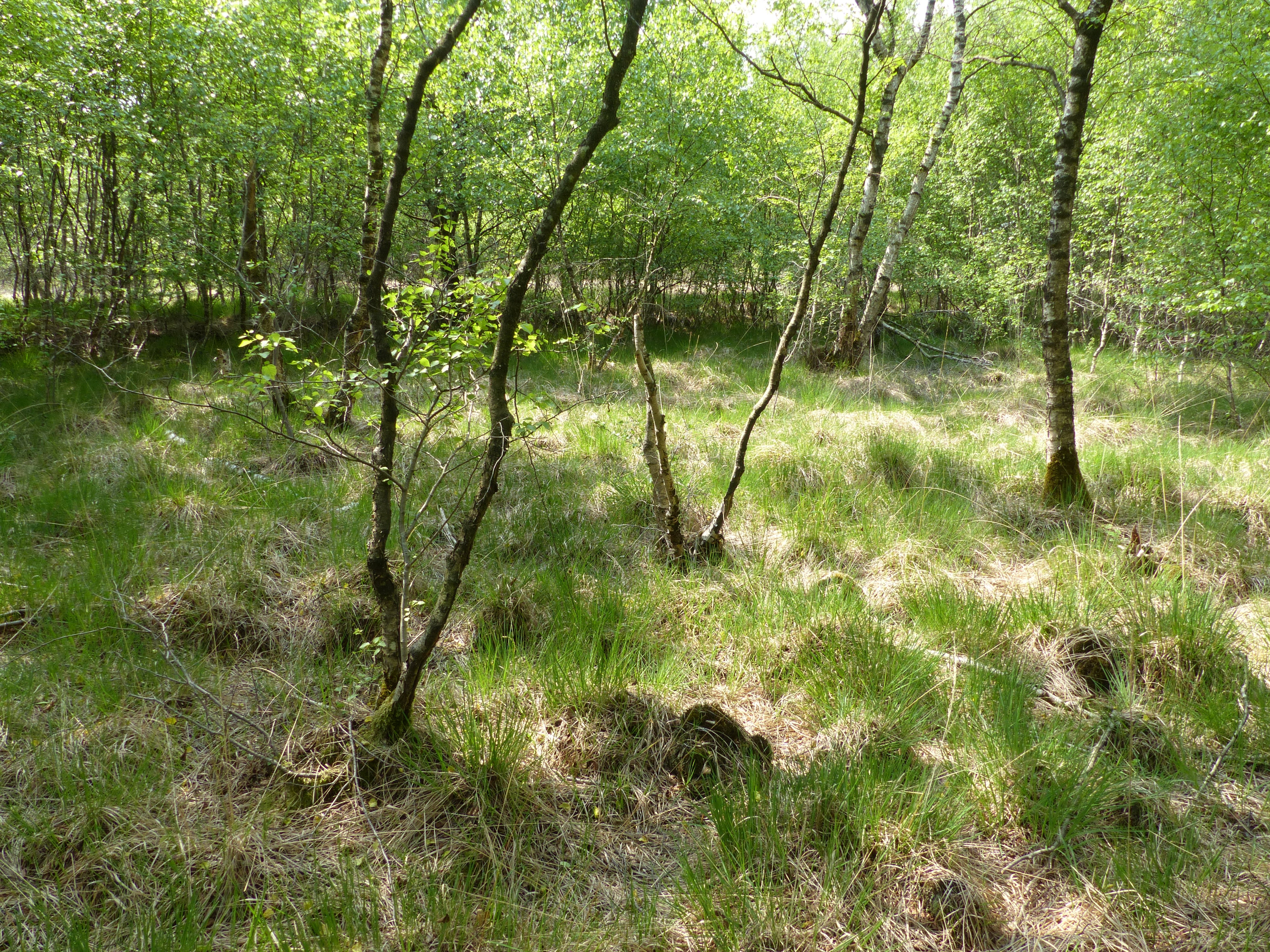 Birken in der Bockholter Dose